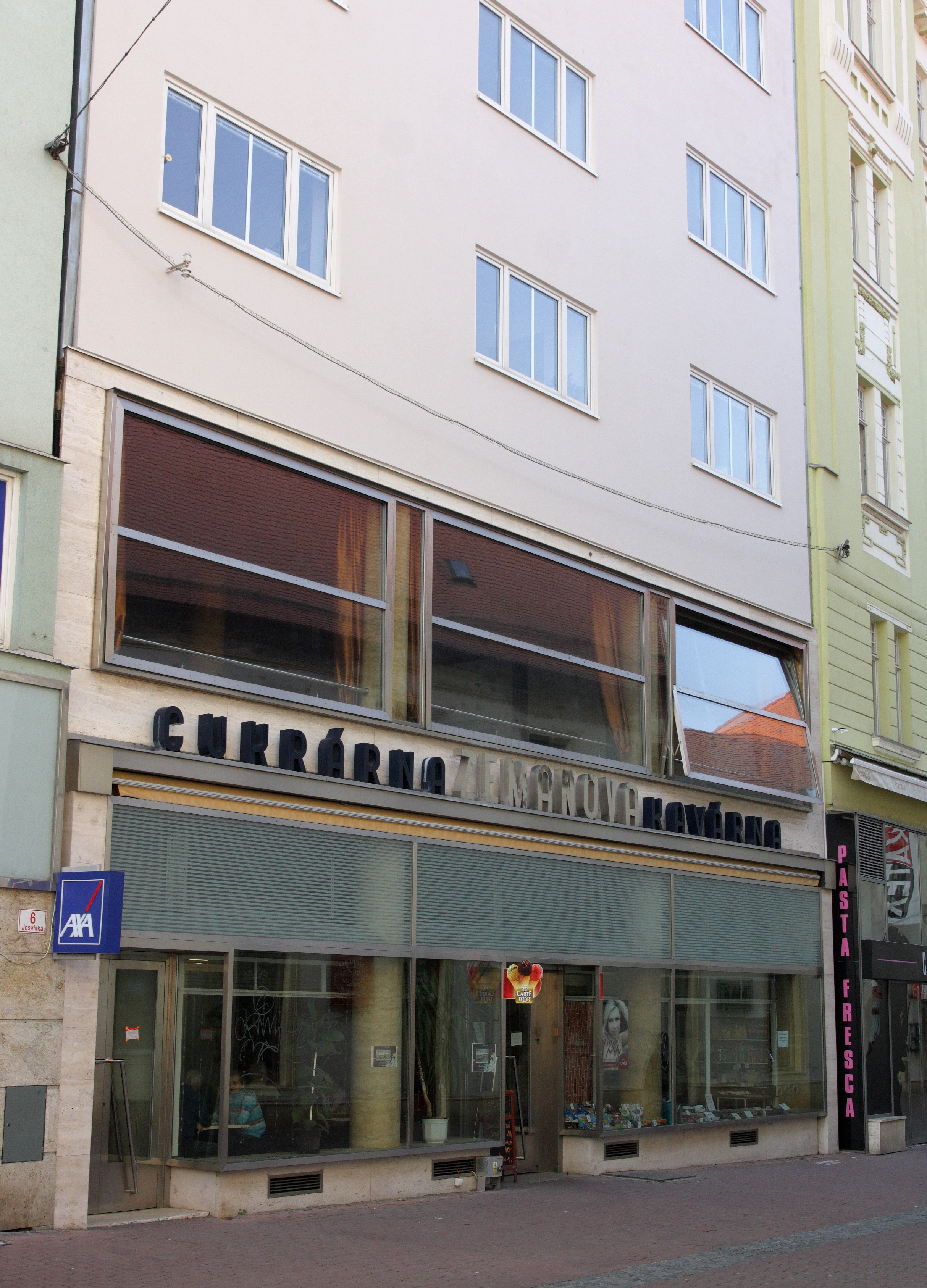 Brno - Josefská, Zemanova cukrárna a kavárna.